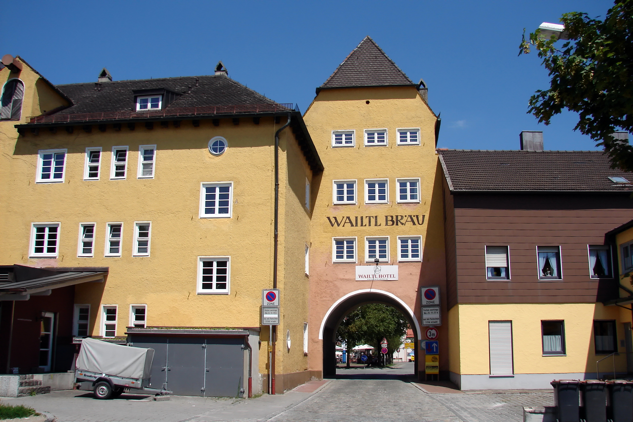 Westliches Stadttor, sog. Oberes oder Isener Tor